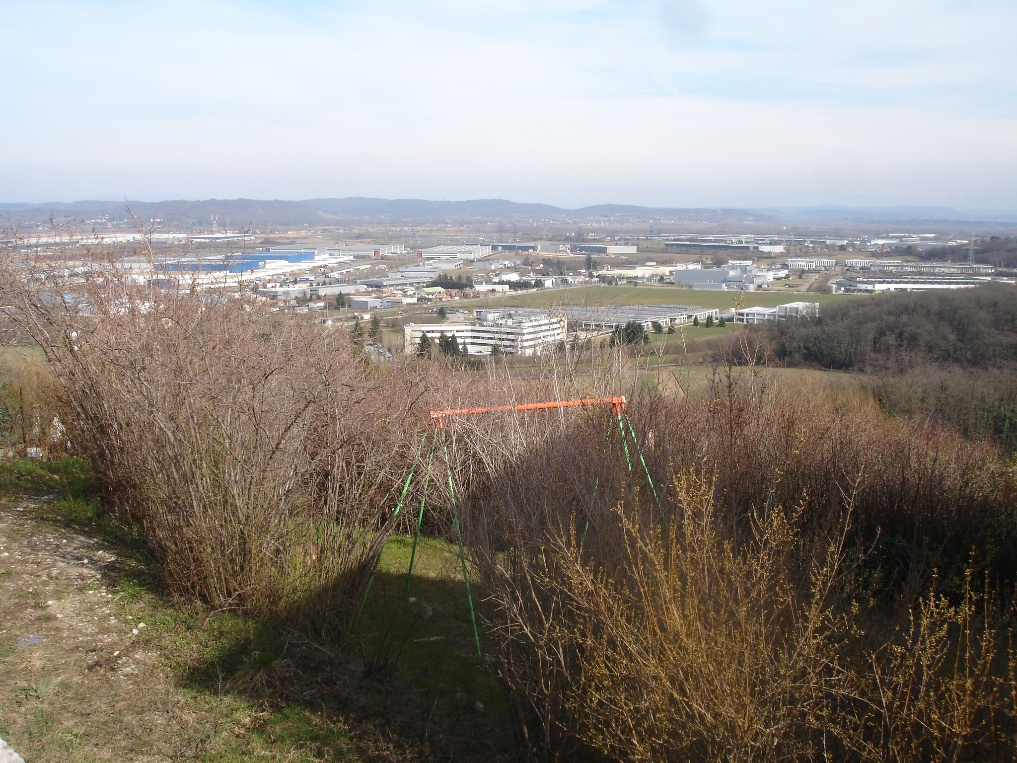 Grenay (38) : La plaine d'activités vue de la table d'orientation